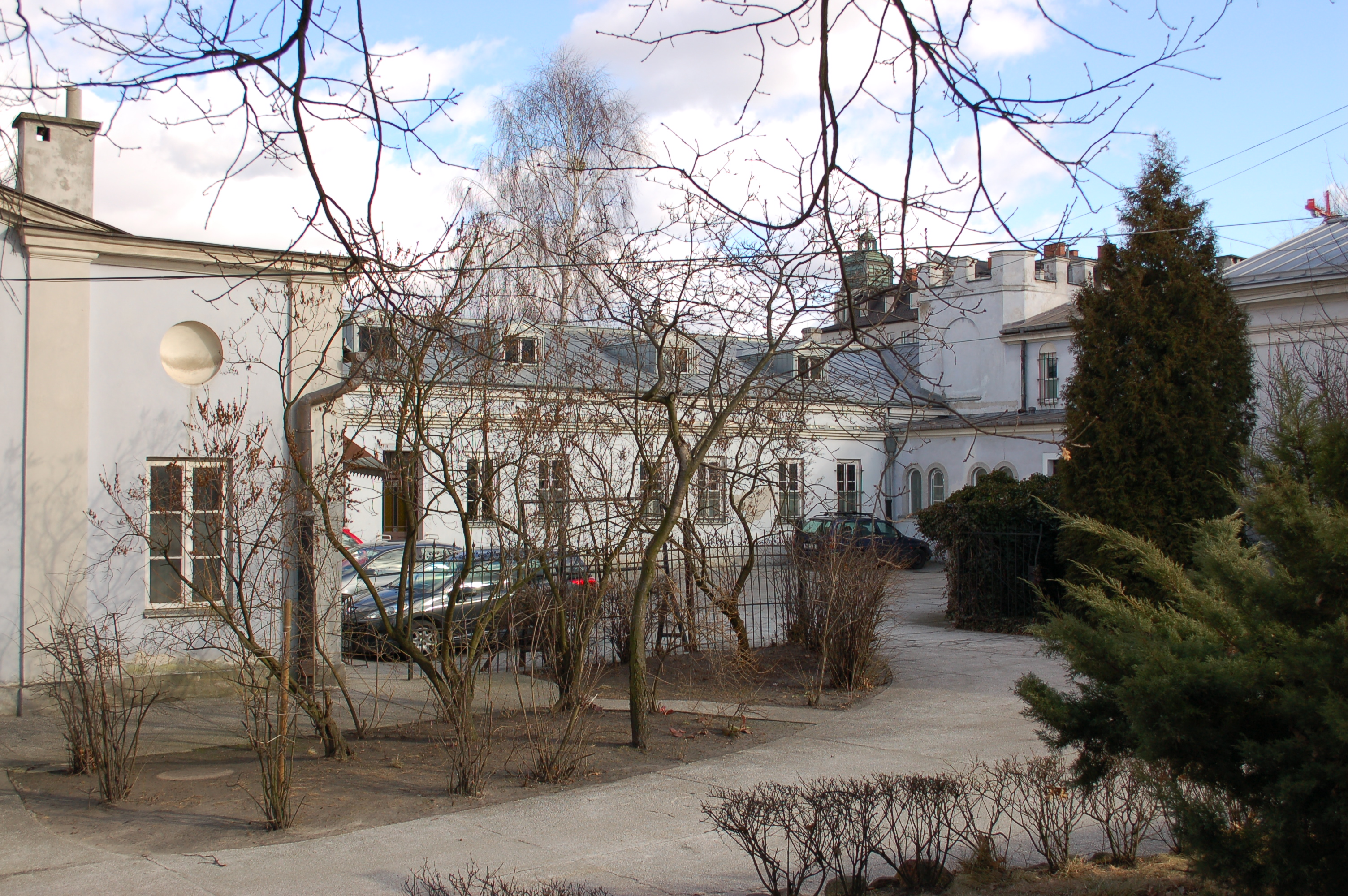 Biernacki Palast Warschau